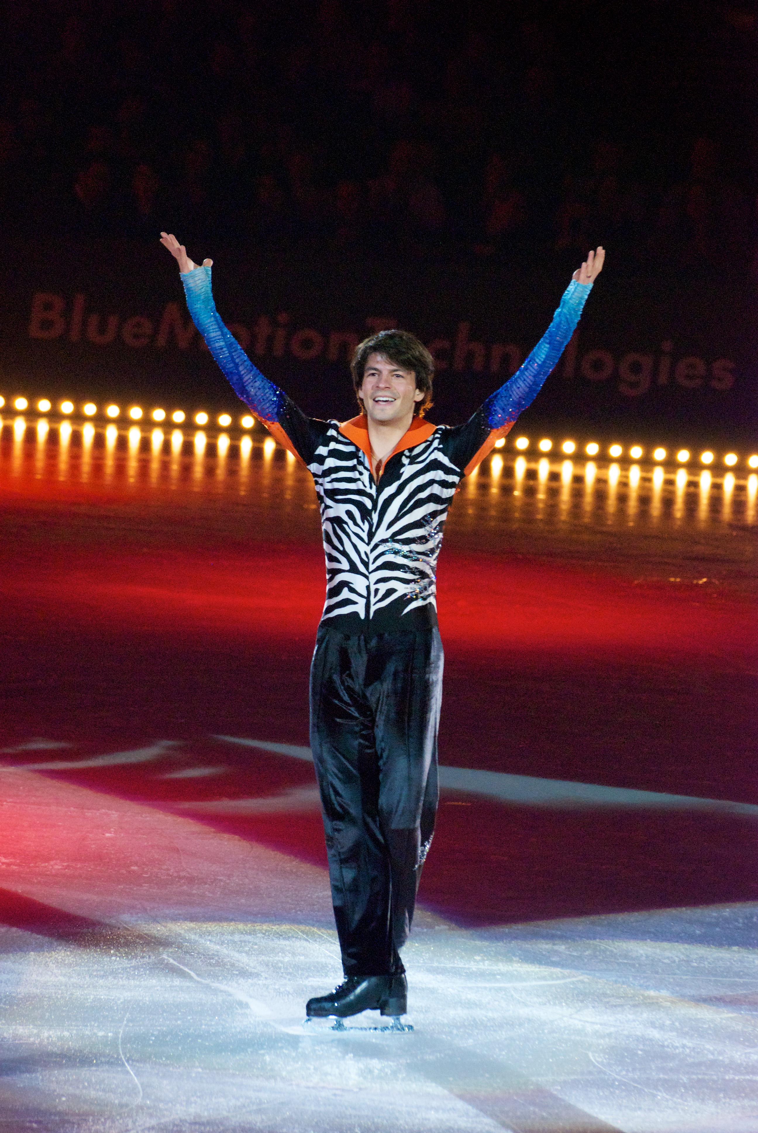 Stéphane Lambiel